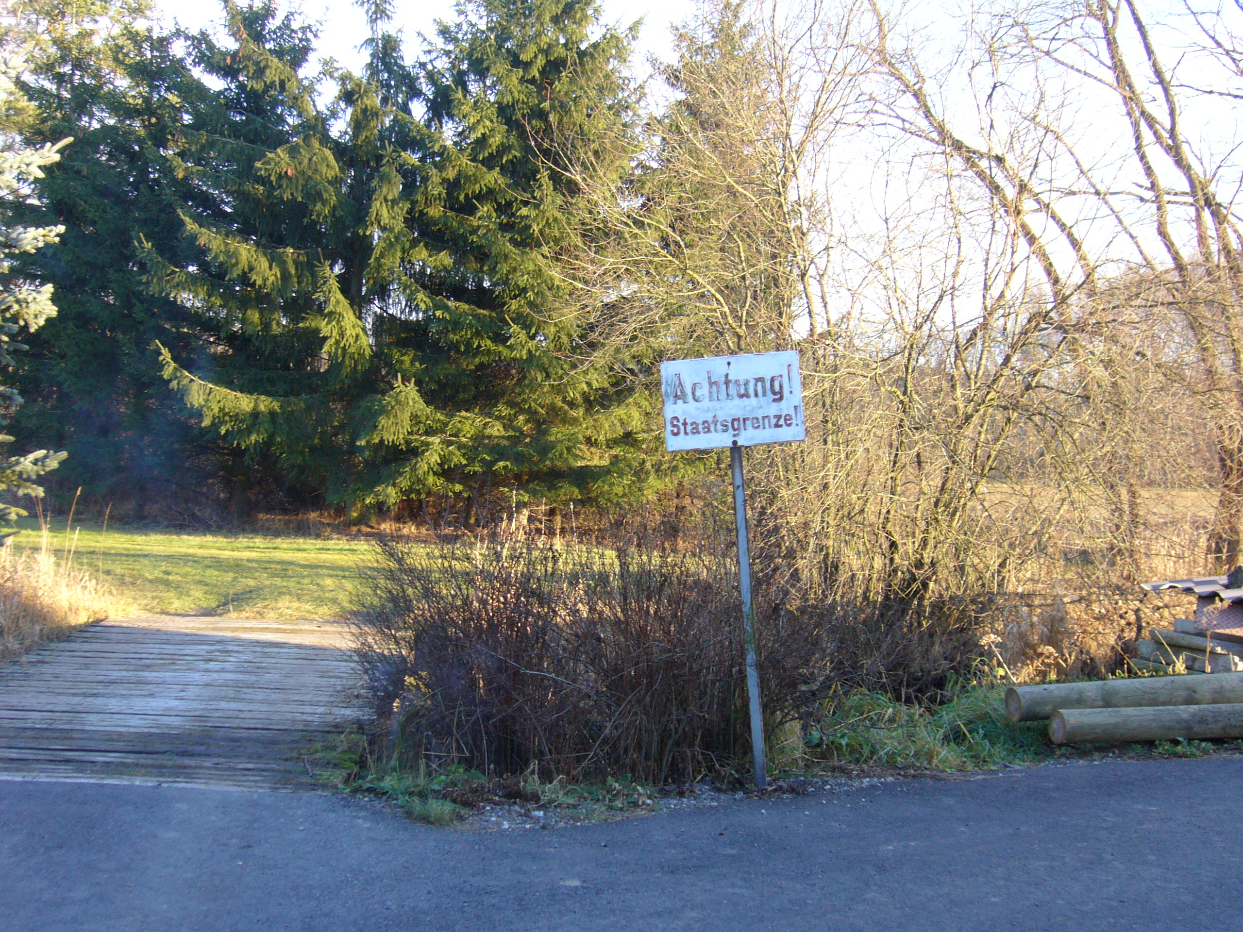 Stiegersdorf Richtung tschechische Grenze, Leopoldschlag, OÖ